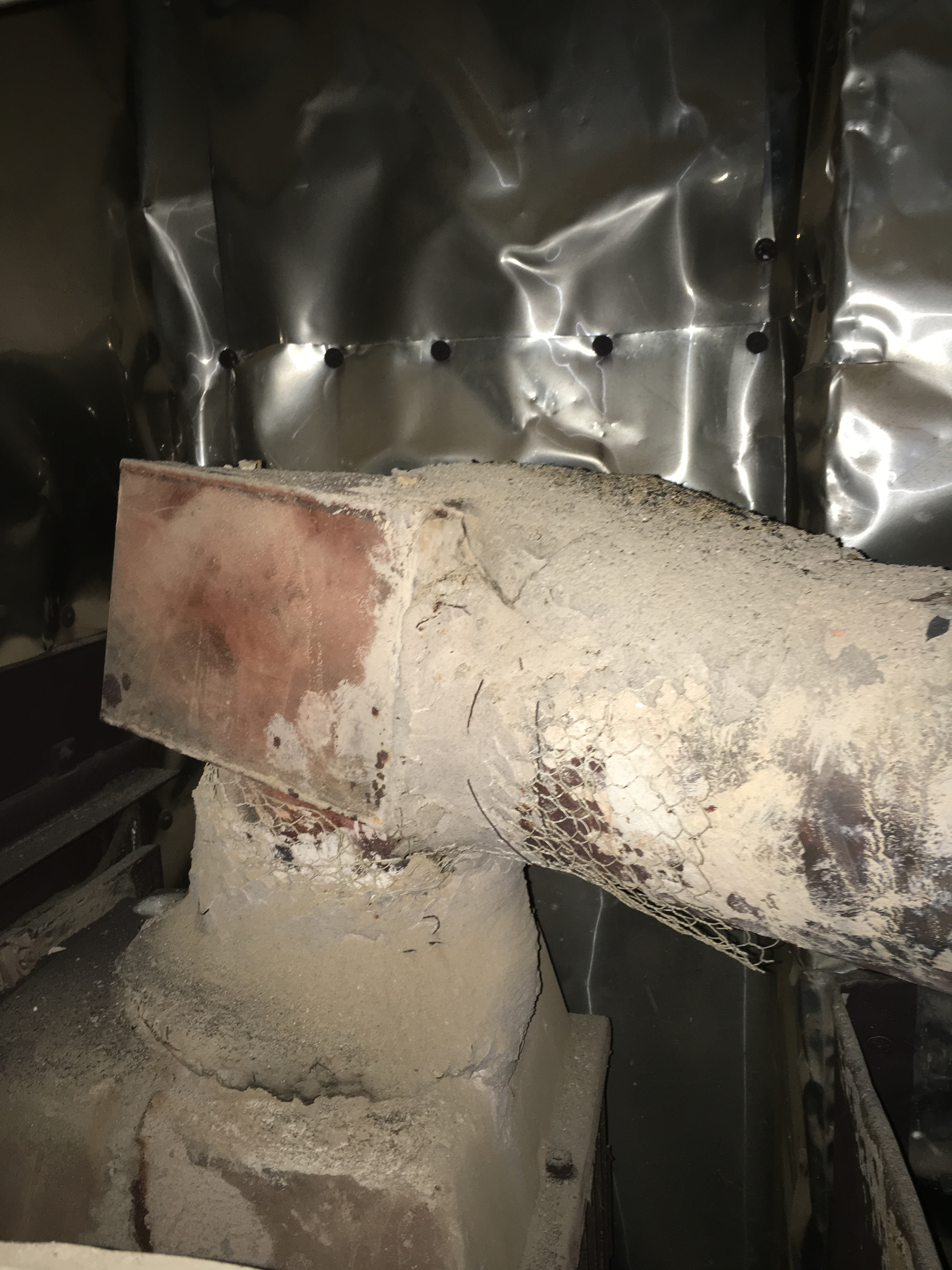 Der Wärmetauscher der Warmluftheizung über der Brennkammer. Hier wird die kalte Luft, die aus den Räumen einströmt, erhitzt und wieder zurückgeleitet.